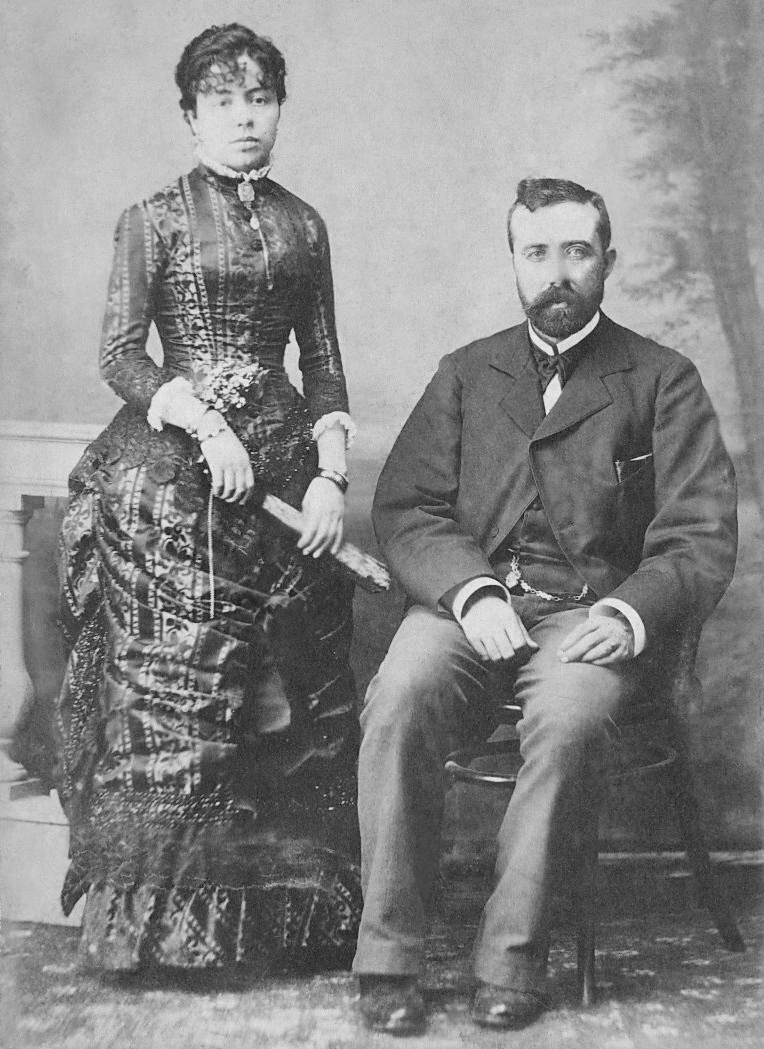 Enrique Otero Sotelo e Eladia Pedrayo Ansoar, pais de Ramón Otero Pedrayo